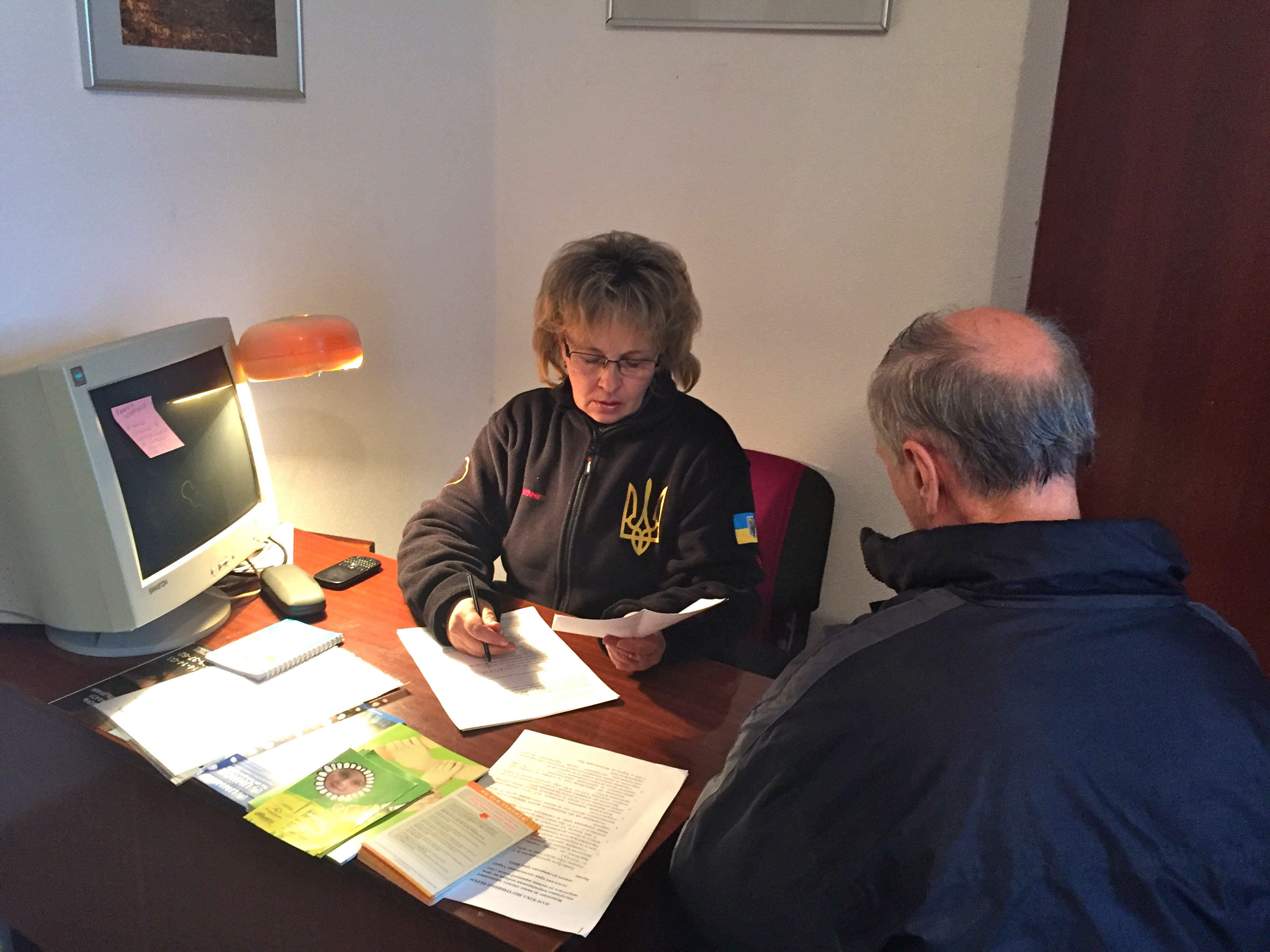 Консультації волонтерів «Станції Харків» із соціальних питань